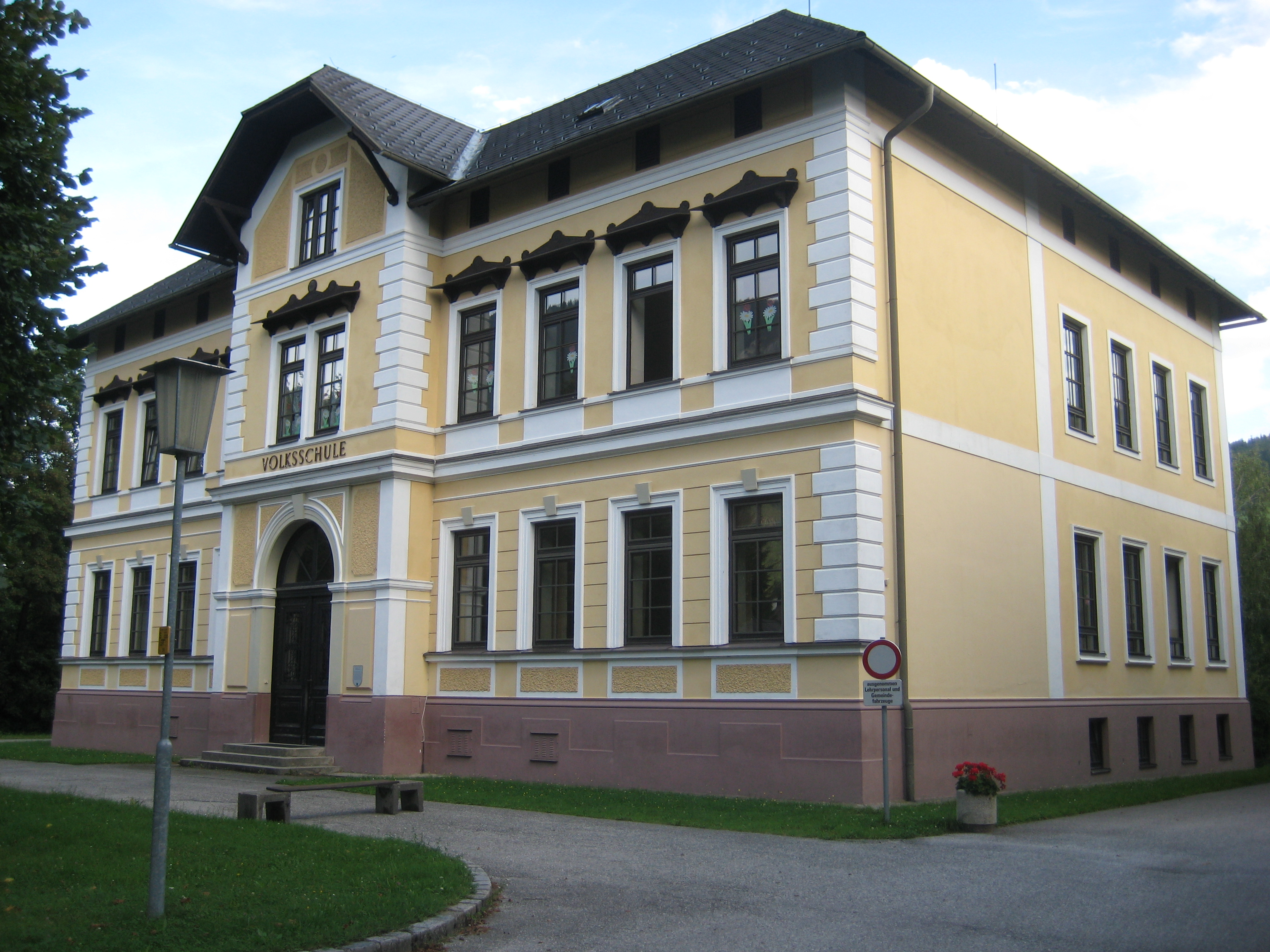 Volksschule in Reichenau an der Rax (Niederösterreich), Schulgasse. Eine Tafel an der Volksschule trägt folgende Aufschrift: „Volksschule Die alte, seit den Jahre 1787 bestandene Schule am Erlangerplatz, war schon fast unbenützbar geworden, als der Ortsschulrat 1888 einen Neubau beschloß. Dieser wurde nach Plänen der Architekten Carl und Moritz Hinträger in dem im Entstehen begriffenen Villenviertel 'Neu Reichenau' errichtet und am 31. 5. 1890 eröffnet. An der Einweihung der Turnhalle (heute Bader Waißnix-Schlößl) im Jahre 1912, nahm als Ehrengast Erzherzog Karl Franz Josef (ab 1916 Kaiser Karl I.) teil. Später als Bürger- und Hauptschule geführt, ist in dem Schulhaus seit 1972 die Zentralvolksschule der Gemeinde Reichenau untergebracht. Durch eine geglückte Renovierung in den Jahren 1988/89 ist das Schulhaus in seinem äußeren Erscheinungsbild unverändert erhalten geblieben.“